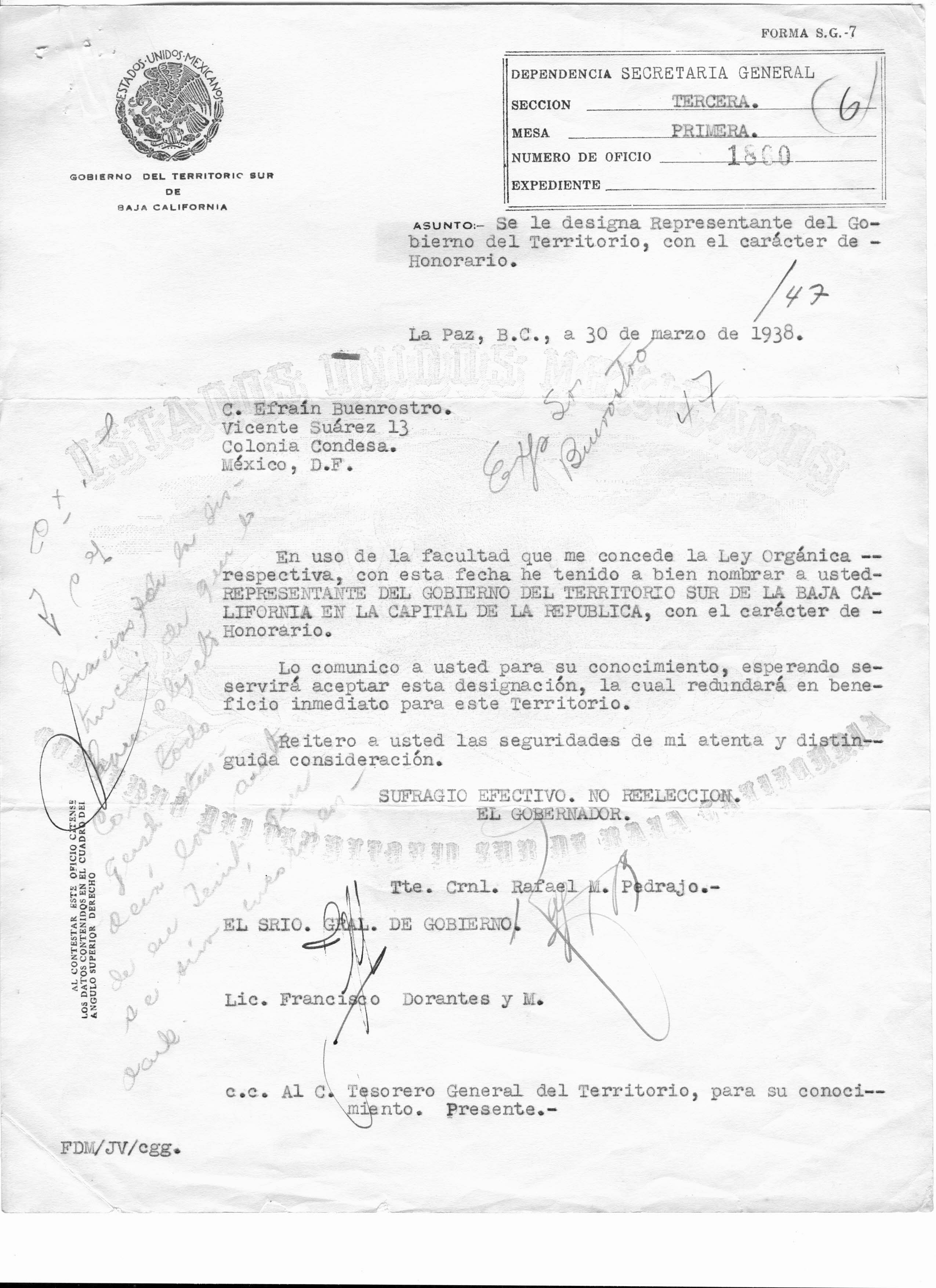 Nombramiento a Efrain Buenrostro como Representante del Gobierno del Territorio Sur de la Baja California en la capital de la Republica